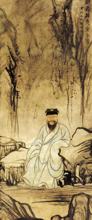 中文（香港）: 明代寫實容像